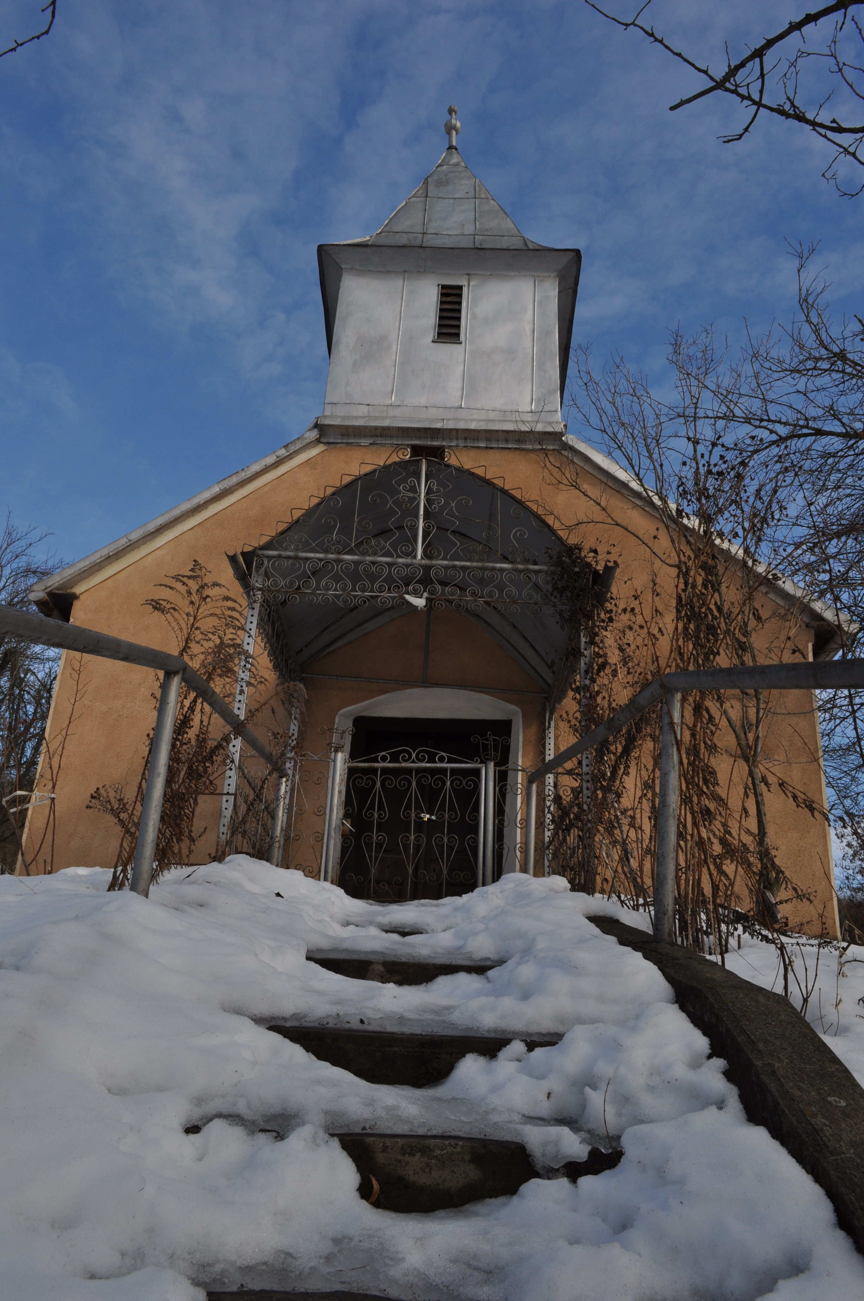 Biserica reformată din Ghirolt, județul Cluj